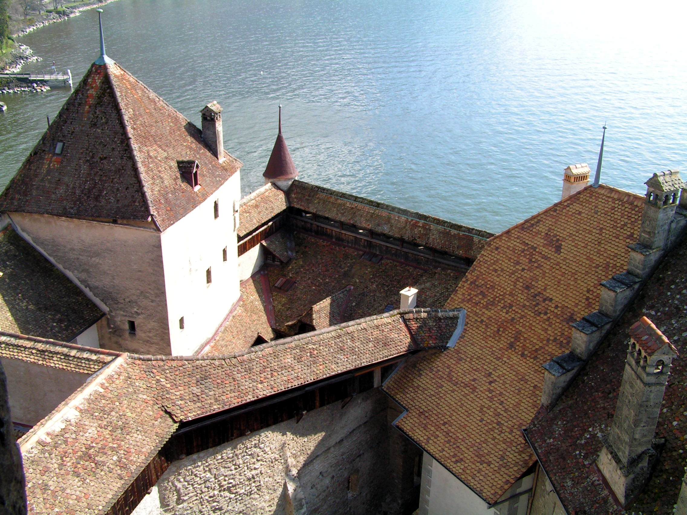 Ausblick vom Bergfried auf das Schloss Chillon, Veytaux-Montreux, Schweiz